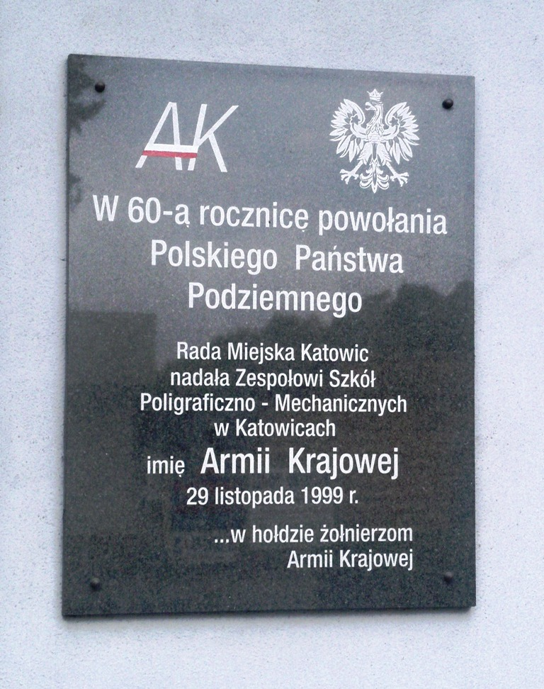 Tablica pamiątkowa na szkole przy ul. Armii Krajowej w Katowicach-Piotrowicach